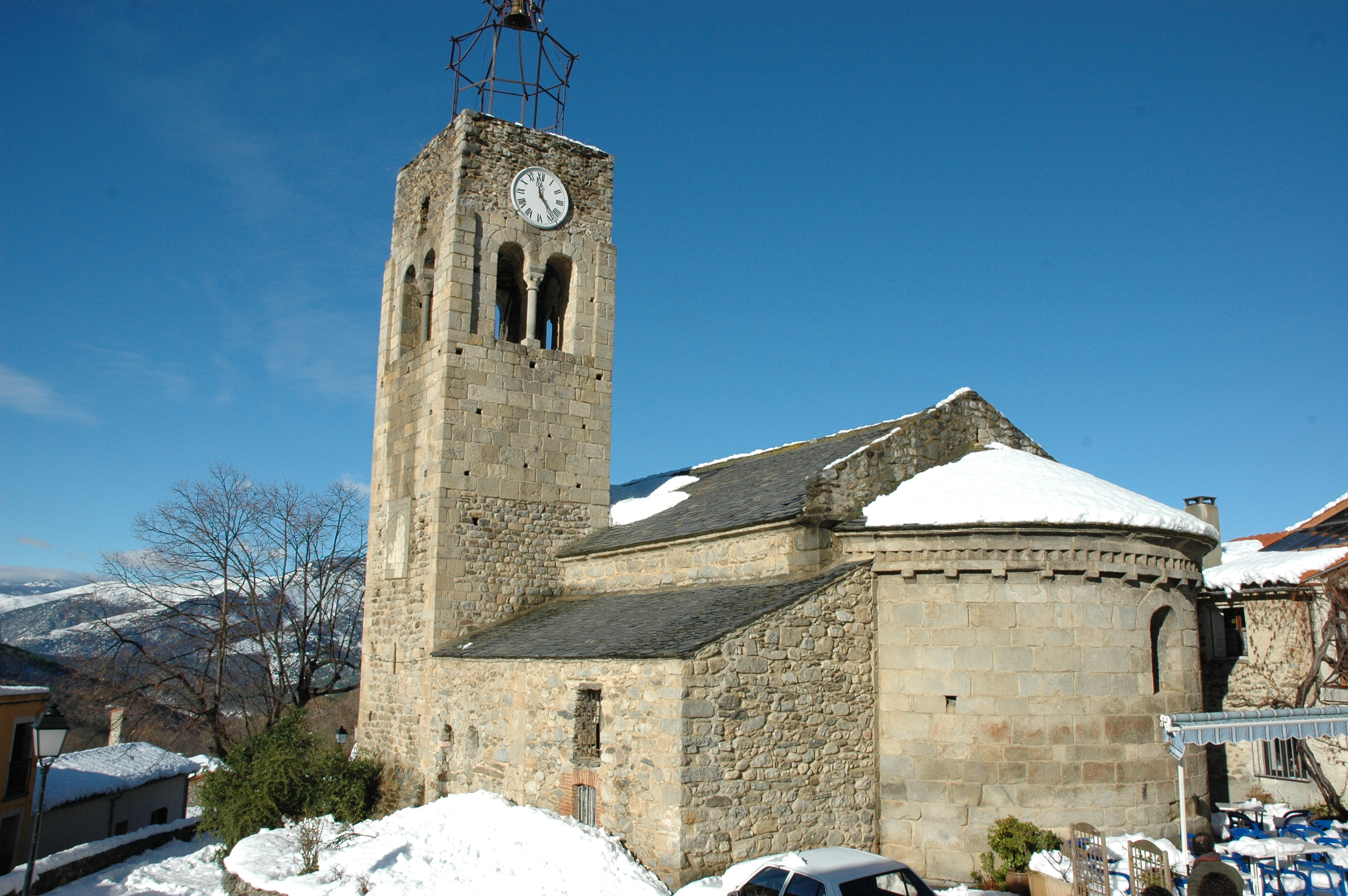 Sant Feliu de Fillols